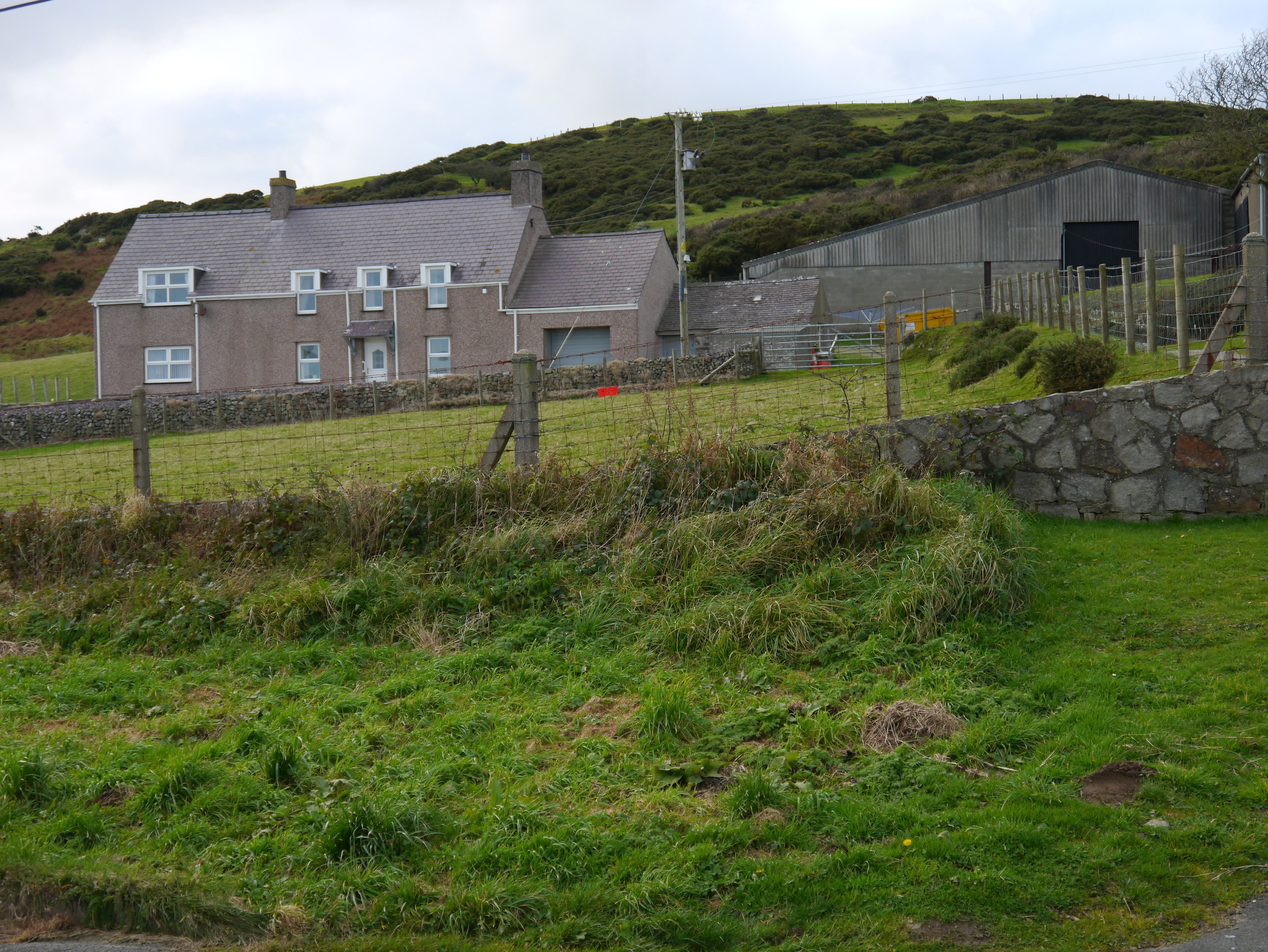 Moelfre, Aberdaron. Tachwedd 2012